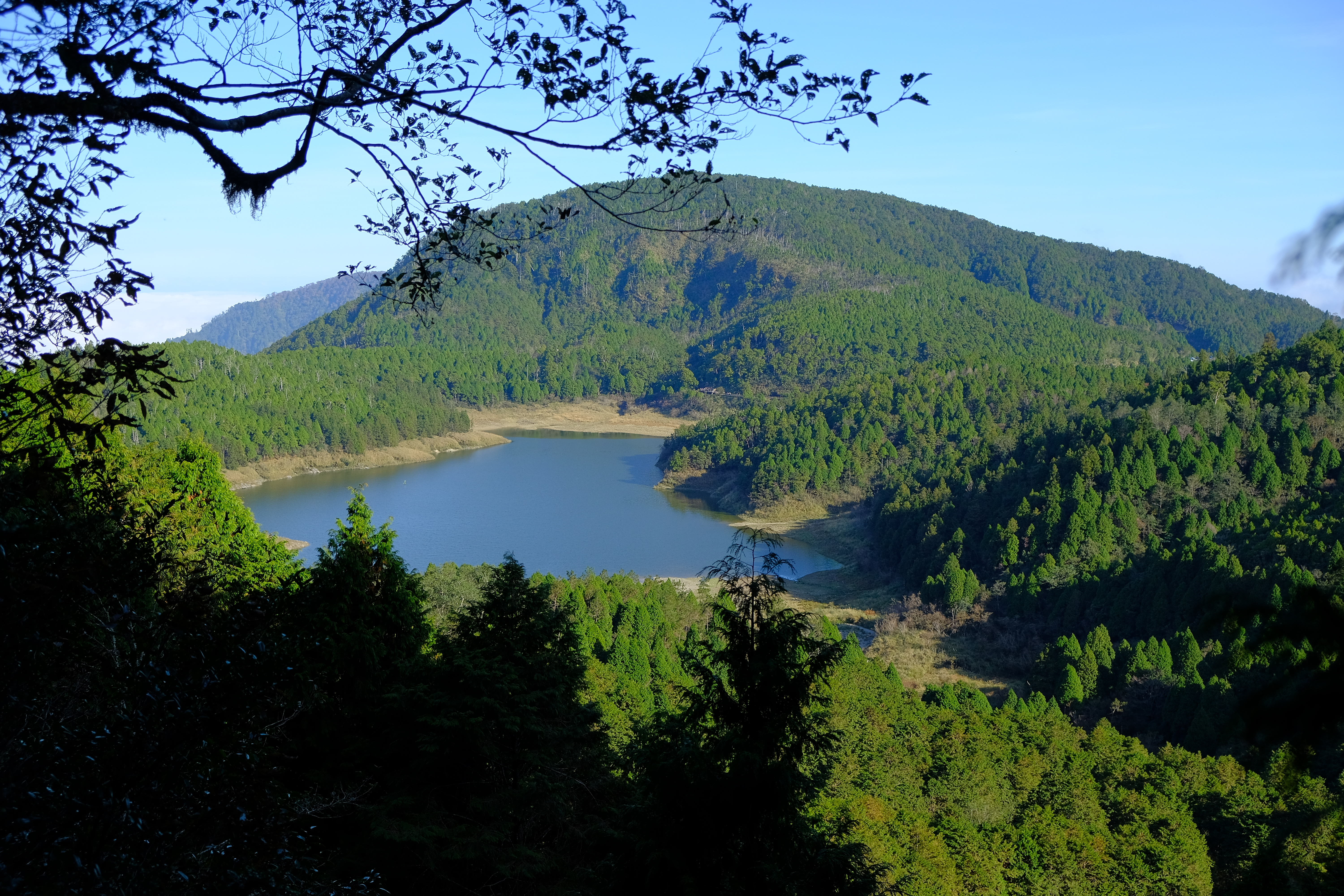 2019 Cueifong Lake Circle Trail 翠峰湖環山步道眺望翠峰湖